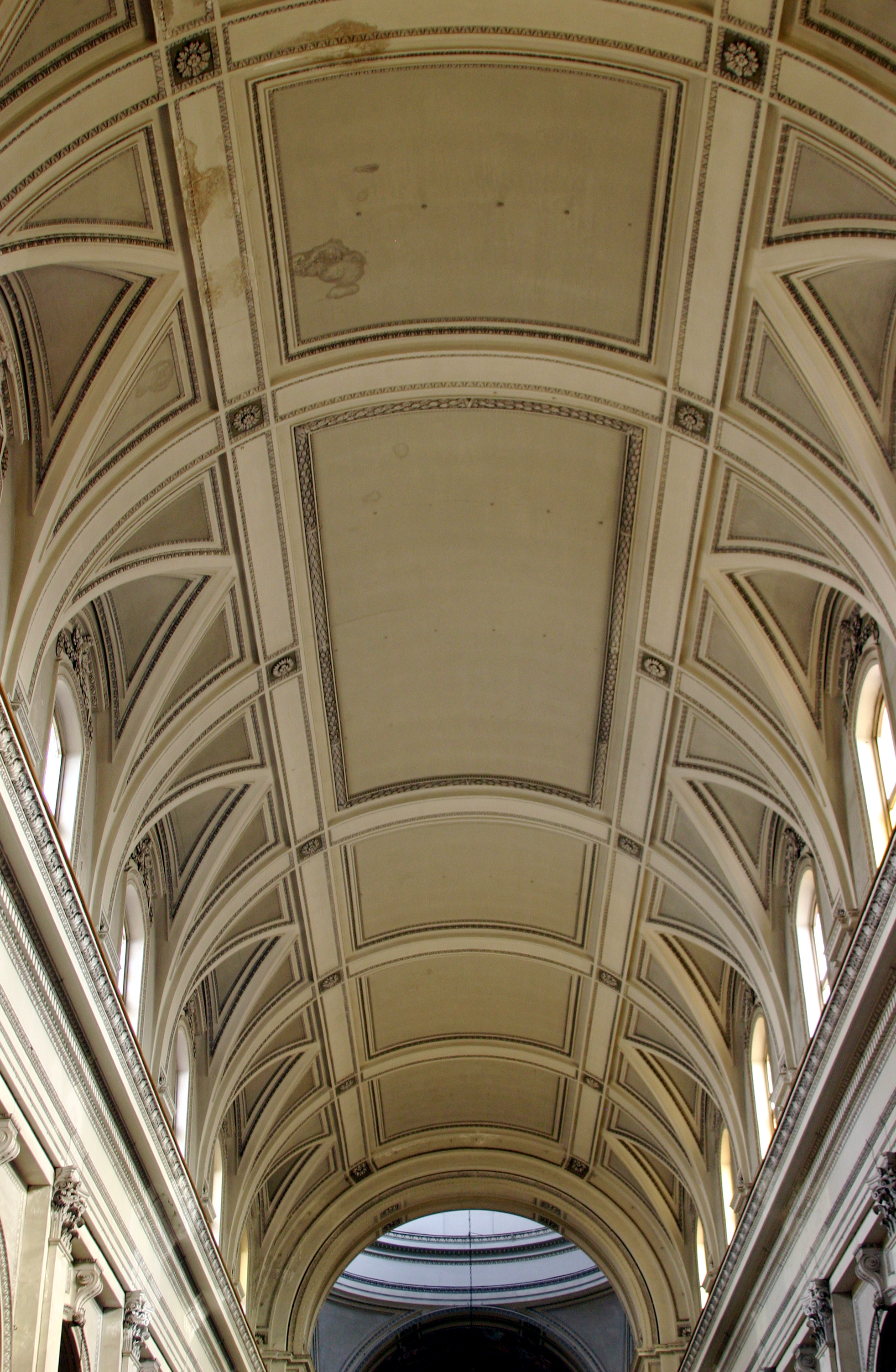 Cathedral of Palermo